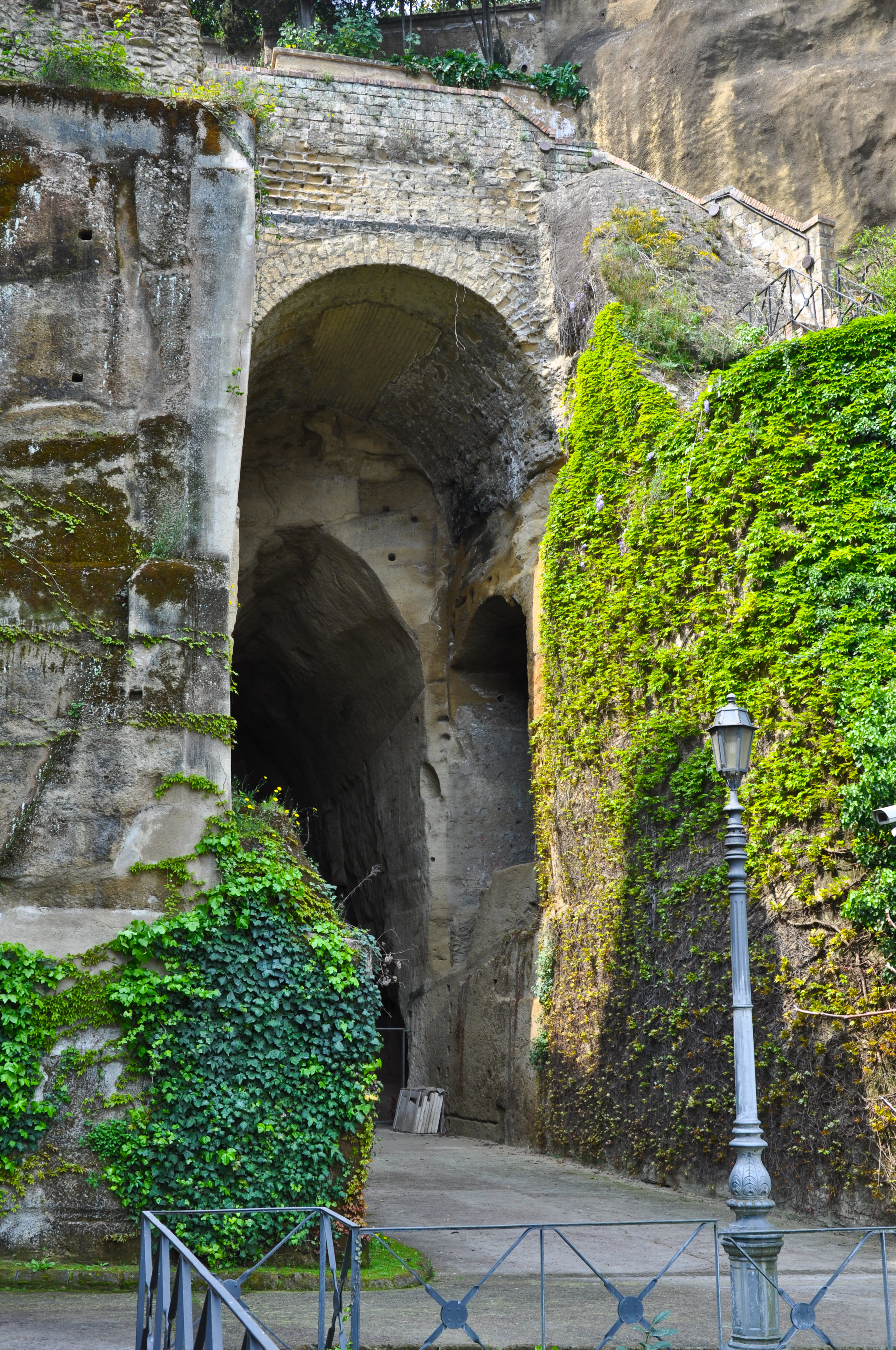 Crypta neapolitana, parco Vergiliano (Napoli)